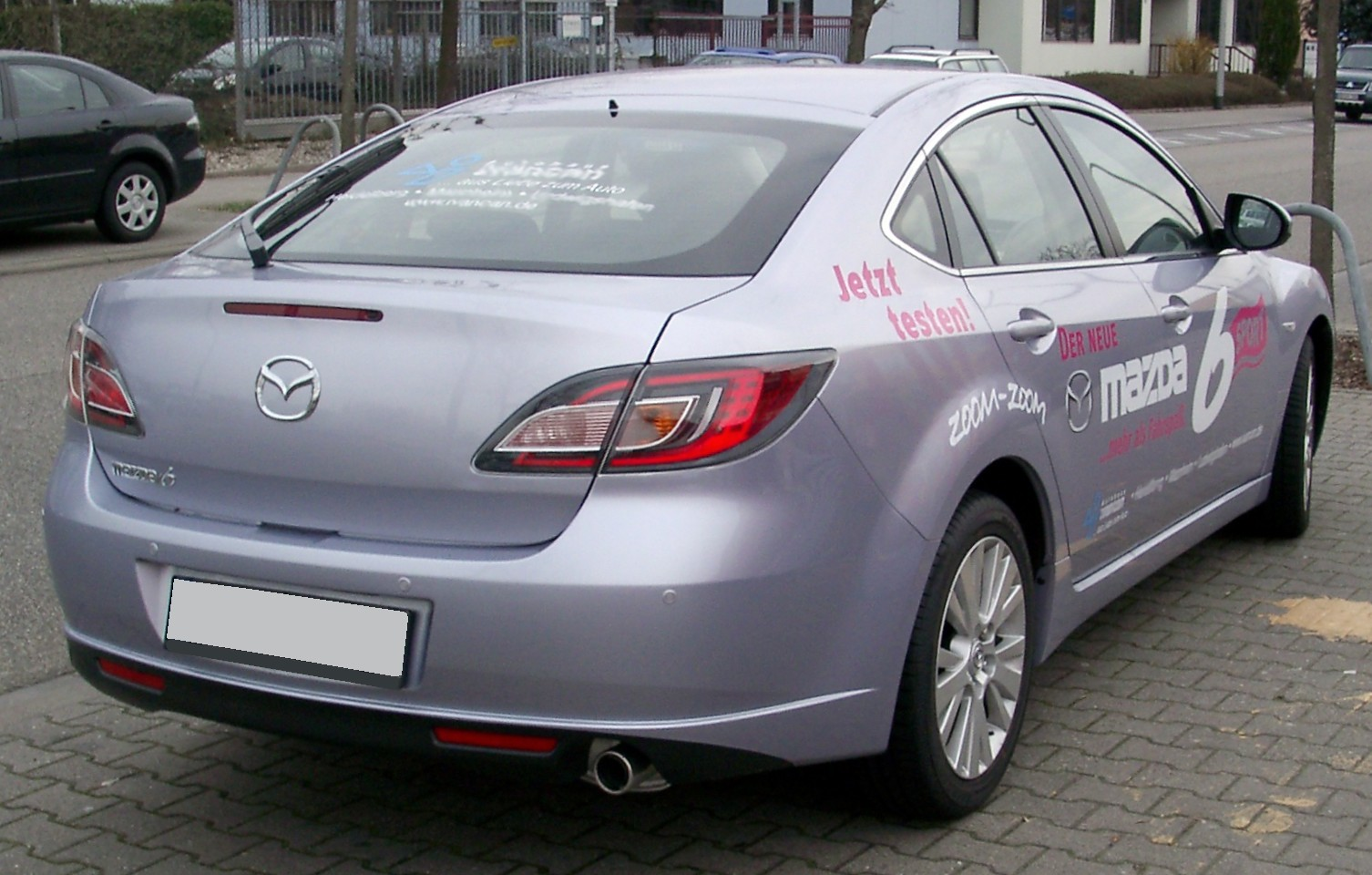 Mazda 6, 2. Generation